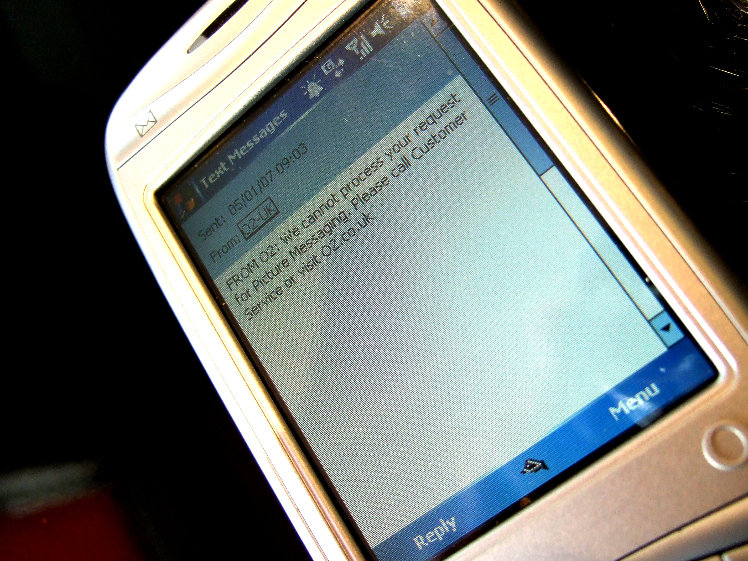 O2 XDA Mini S